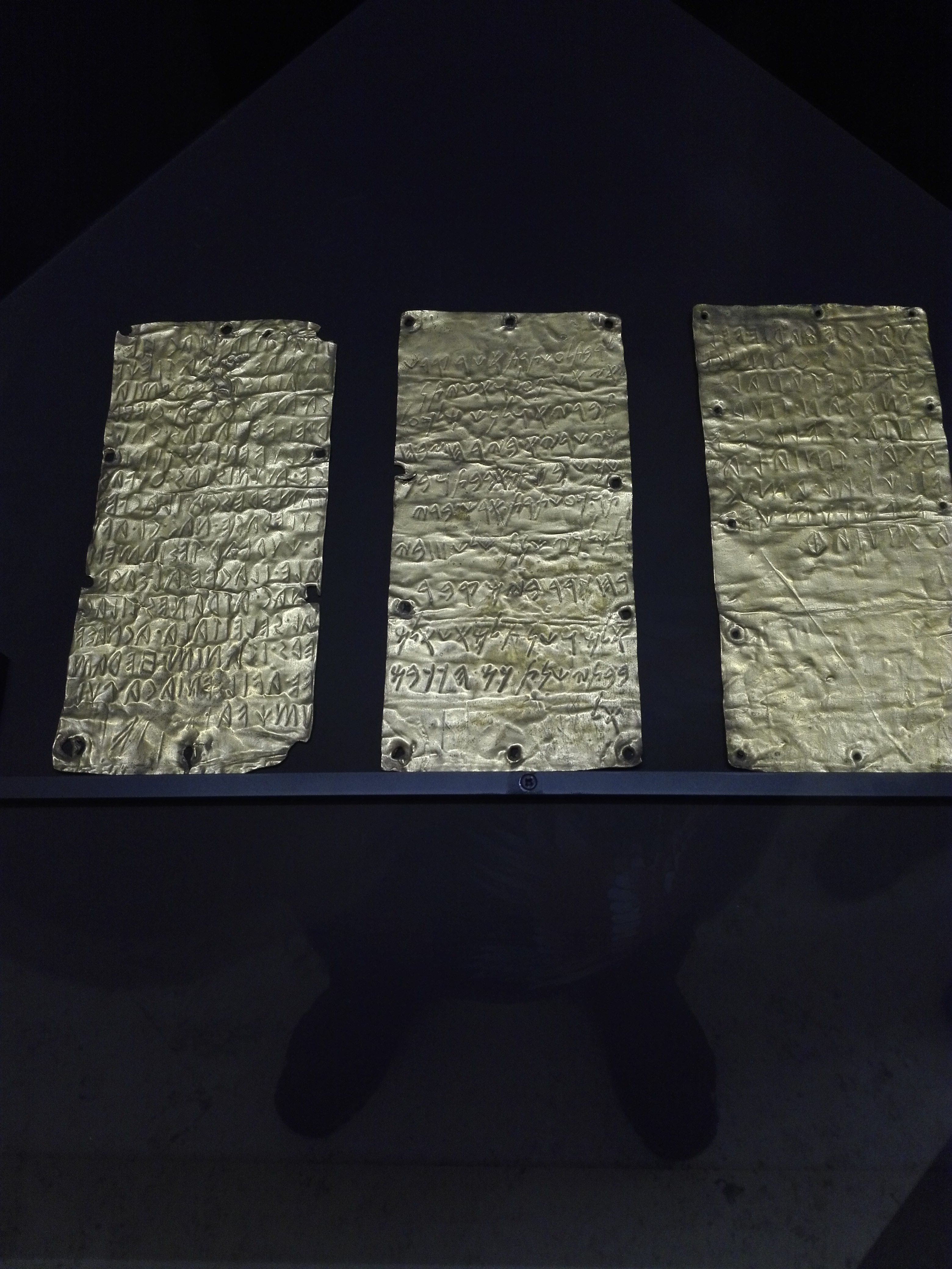 Museo nazionale etrusco di Villa Giulia This is a photo of a monument which is part of cultural heritage of Italy.